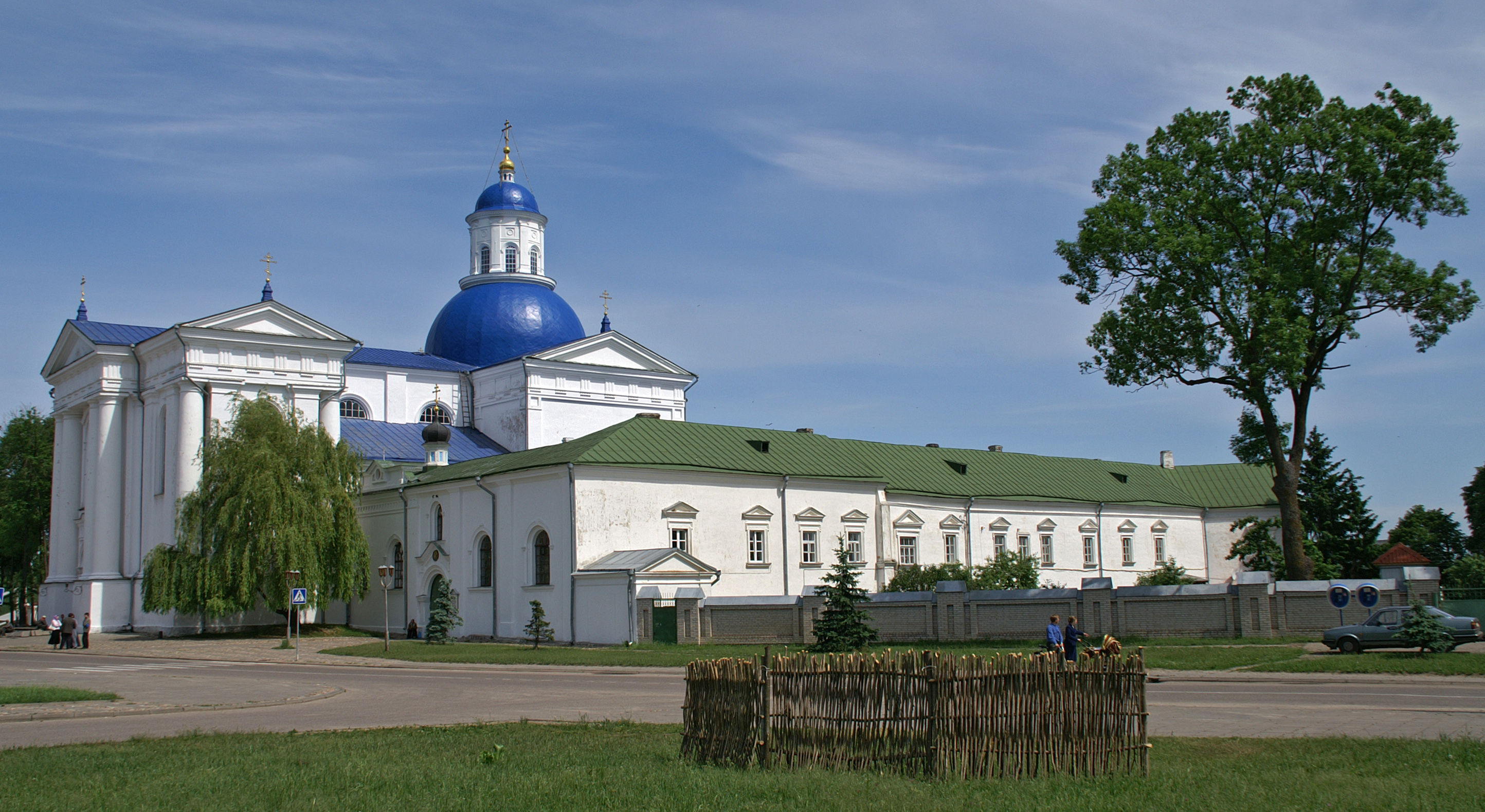 Беларуская (тарашкевіца): Ансамбаль Сьвята-Усьпенскага манастыра:Усьпенскі сабордэкаратыўнае аздабленьне:росьпіс у консе «Спас Пантакратар», арнамэнтальны дэкор на скляпеньнях паўднёвай сакрысьціі і ўсіх нэфаў, іканастас, бакавыя алтарыБогаяўленская царкваКрыжаўзьвіжанская царквазваніцабудынак сэмінарыіжылы корпусгаспадарчыя пабудовы. в. Жыровічы This is a photo of Belarusian heritage monument. Reference number: 411Г000537 ( WLM)